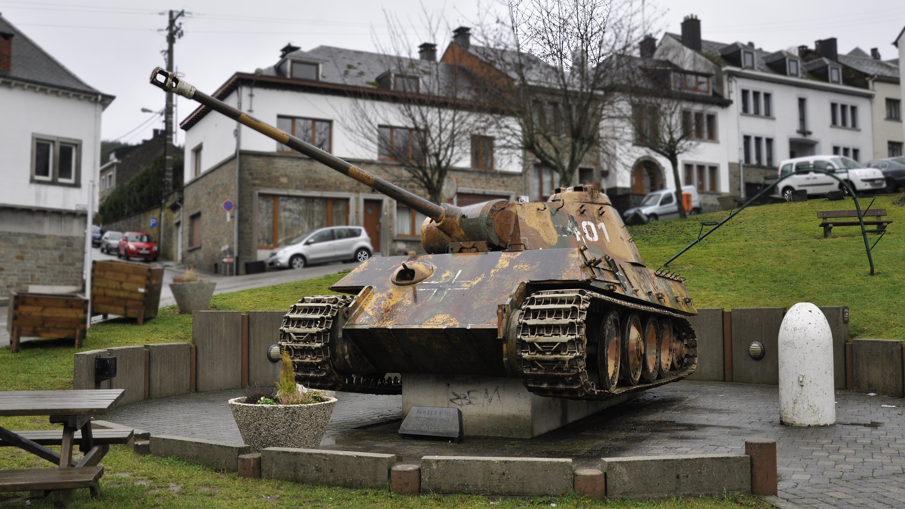 De Panzerkampfwagen V - Panther - te Houffalize, België